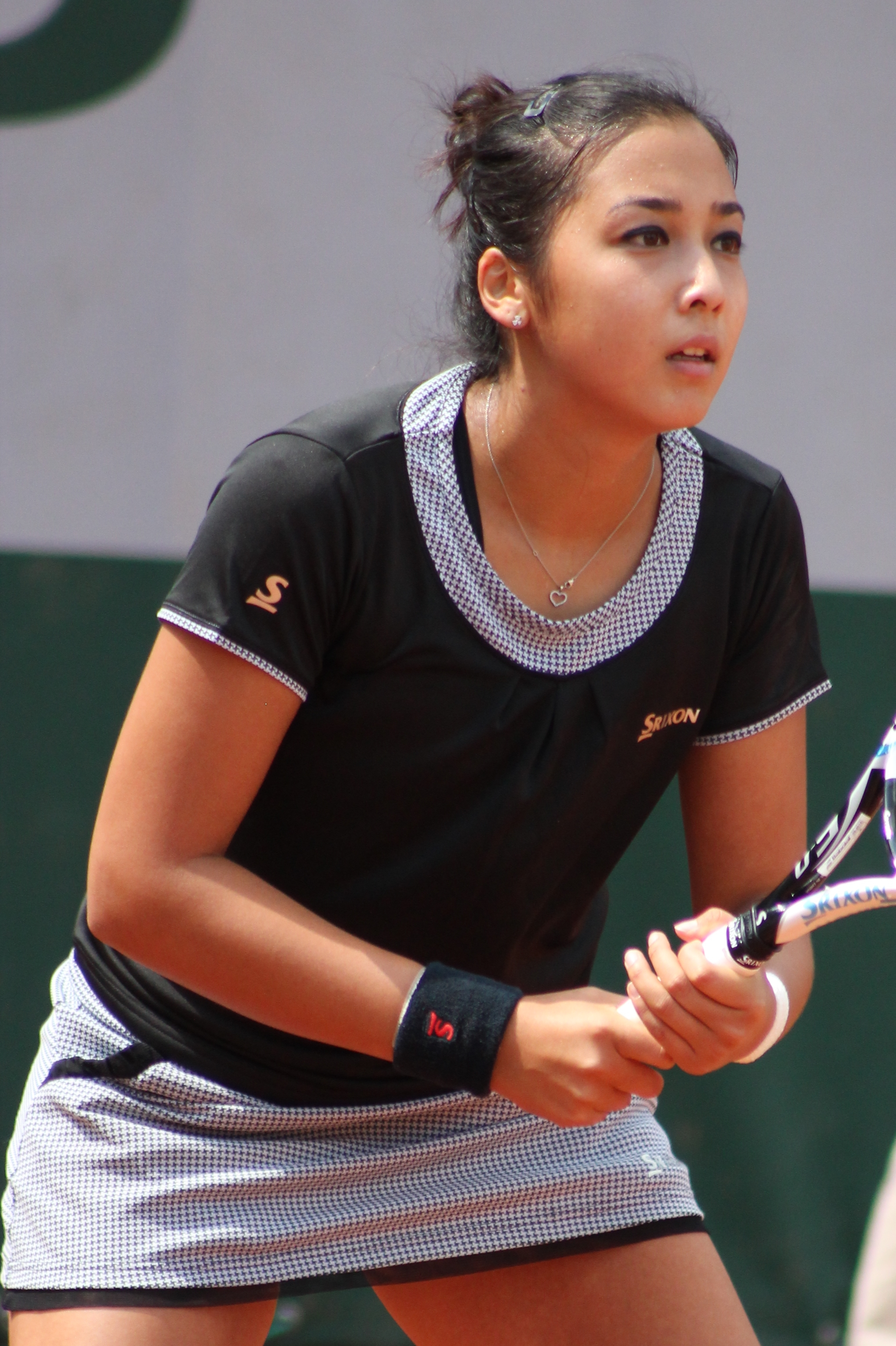 Diyas RG15 (2)